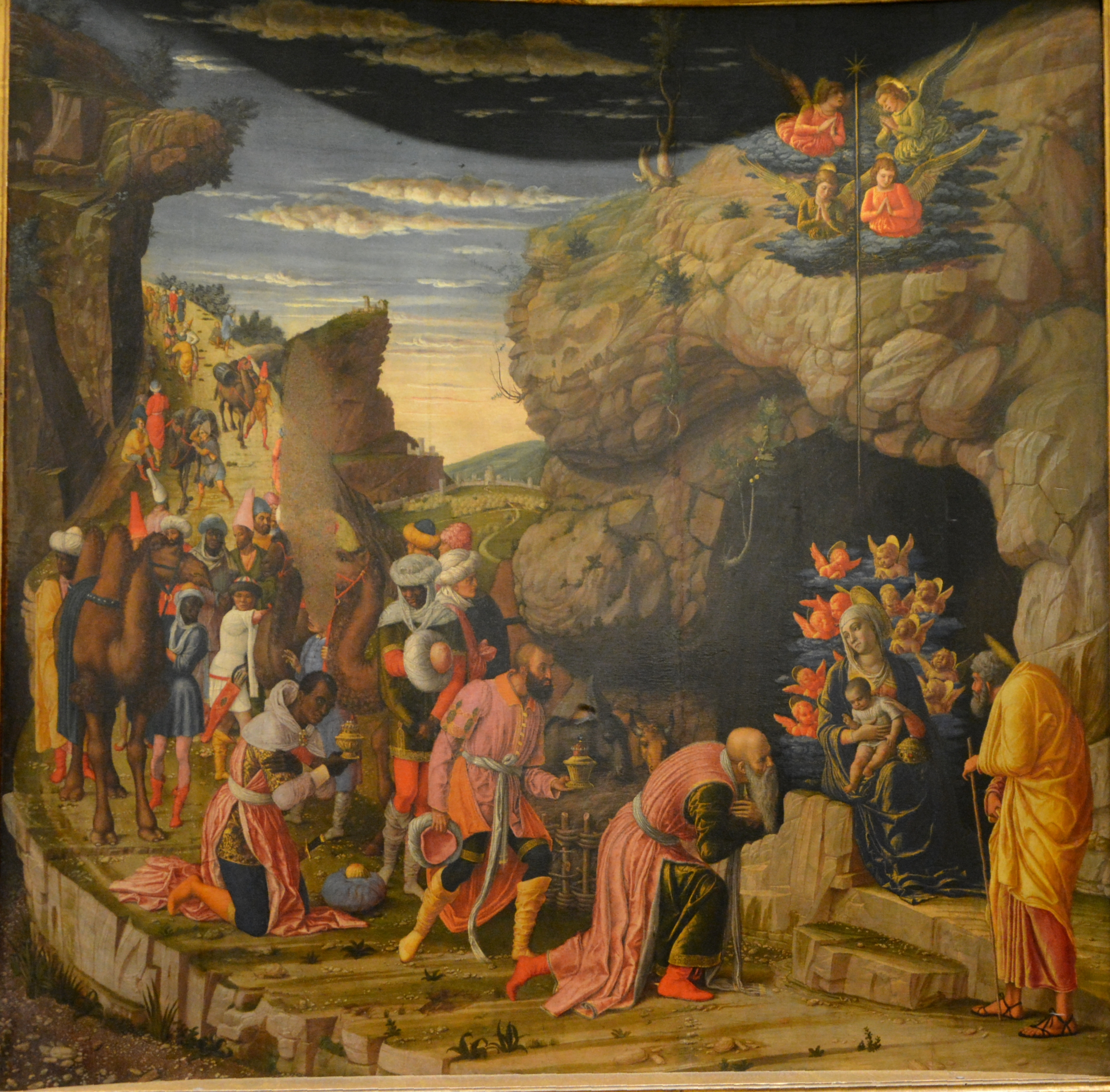 Altarretabel der Palastkapelle des Herzogs von Mantua